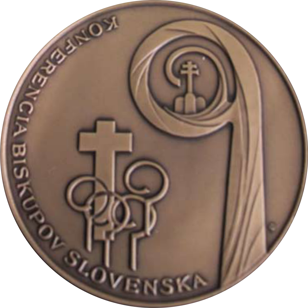 Averz medaile